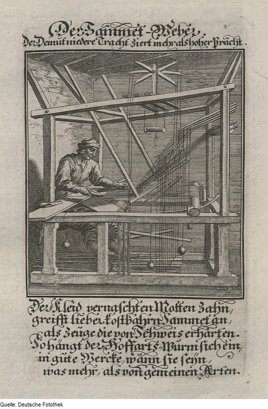 Original image description from the Deutsche Fotothek Ständebuch & Beruf & Handwerk & Weber & Caffamacher & Webstuhl